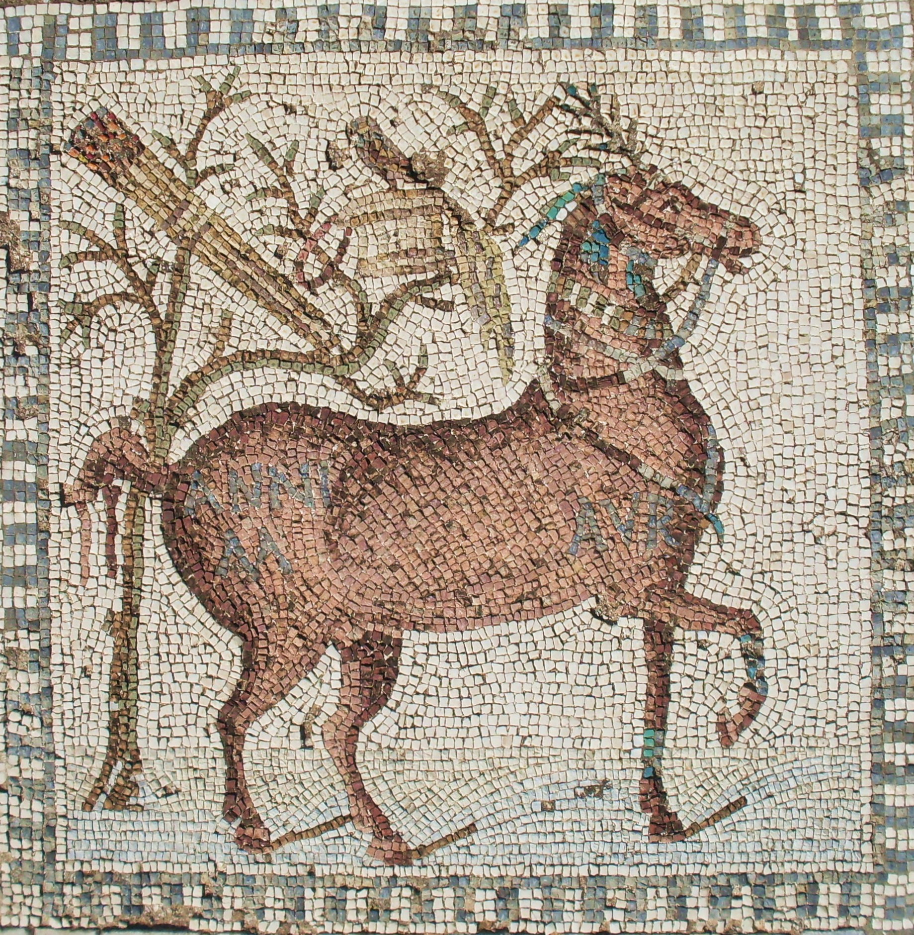 Panneau de la mosaïque des chevaux, l'oiseleur